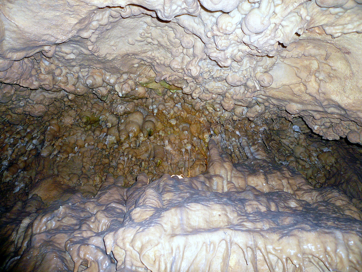 Charlottenhöhle